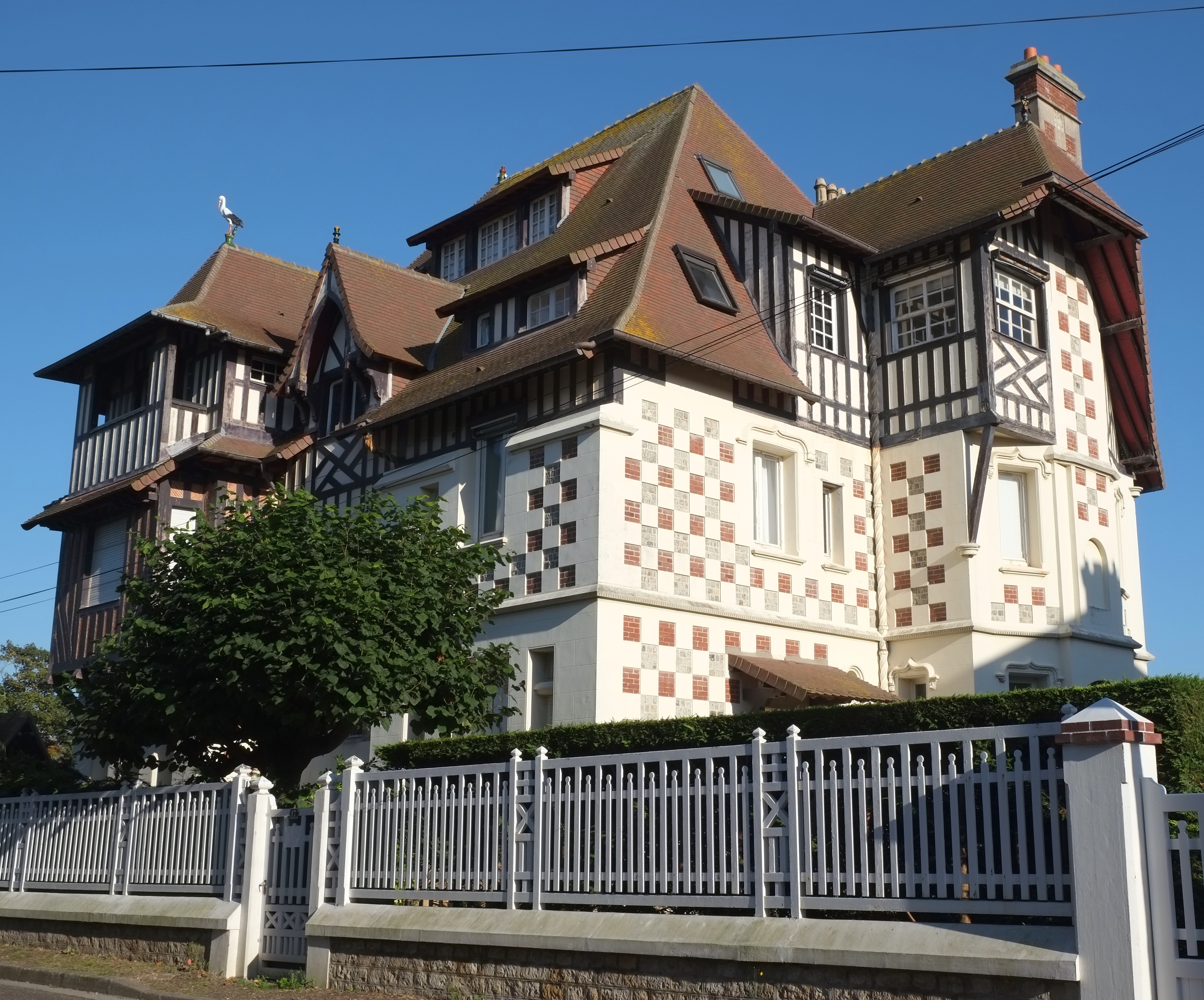 Villa Marie-Antoinette in Cabourg im Département Calvados (Frankreich), Nr. 17 avenue Aristide-Briand